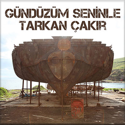 Tarkan Çakır'ın 2018 yılında yayınlanmış olan Gündüzüm Seninle tekli albümünün kapağı.